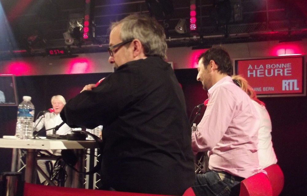 Didier Porte_Regis Mailhot_A la bonne heure